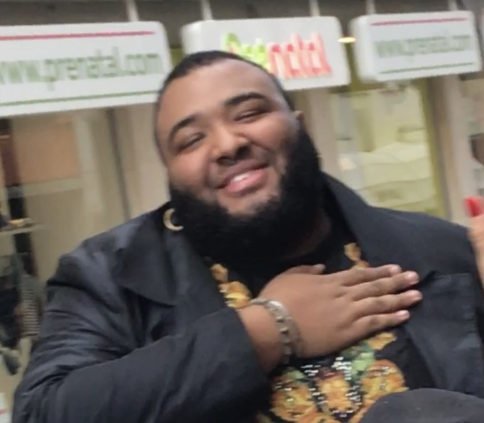 Foto scattata al firma copie a Lecce il 1 Marzo 2017